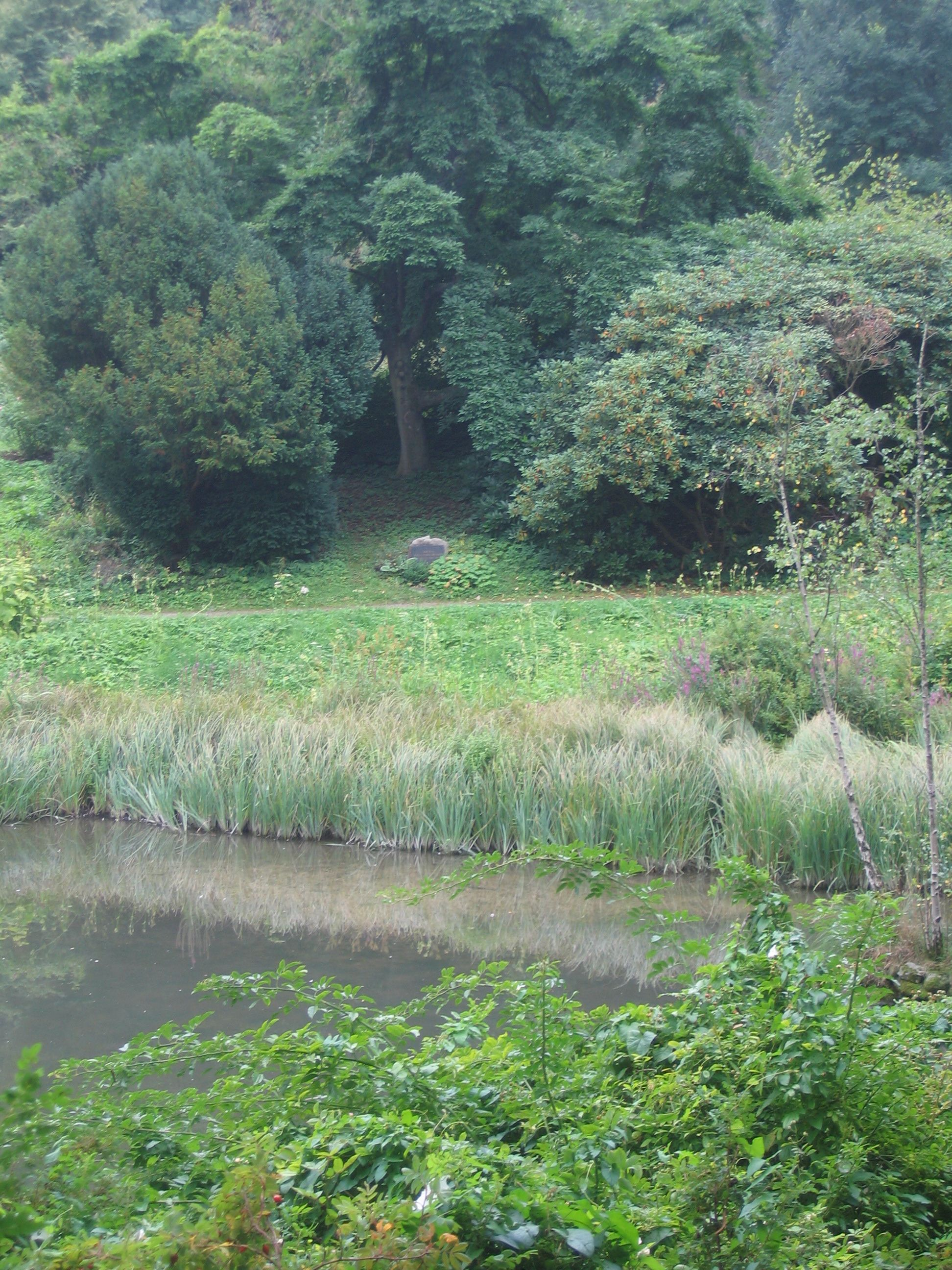 Grab des Kaiserdackels Erdmann auf der Roseninsel im Bergpark Wilhelmshöhe, Kassel